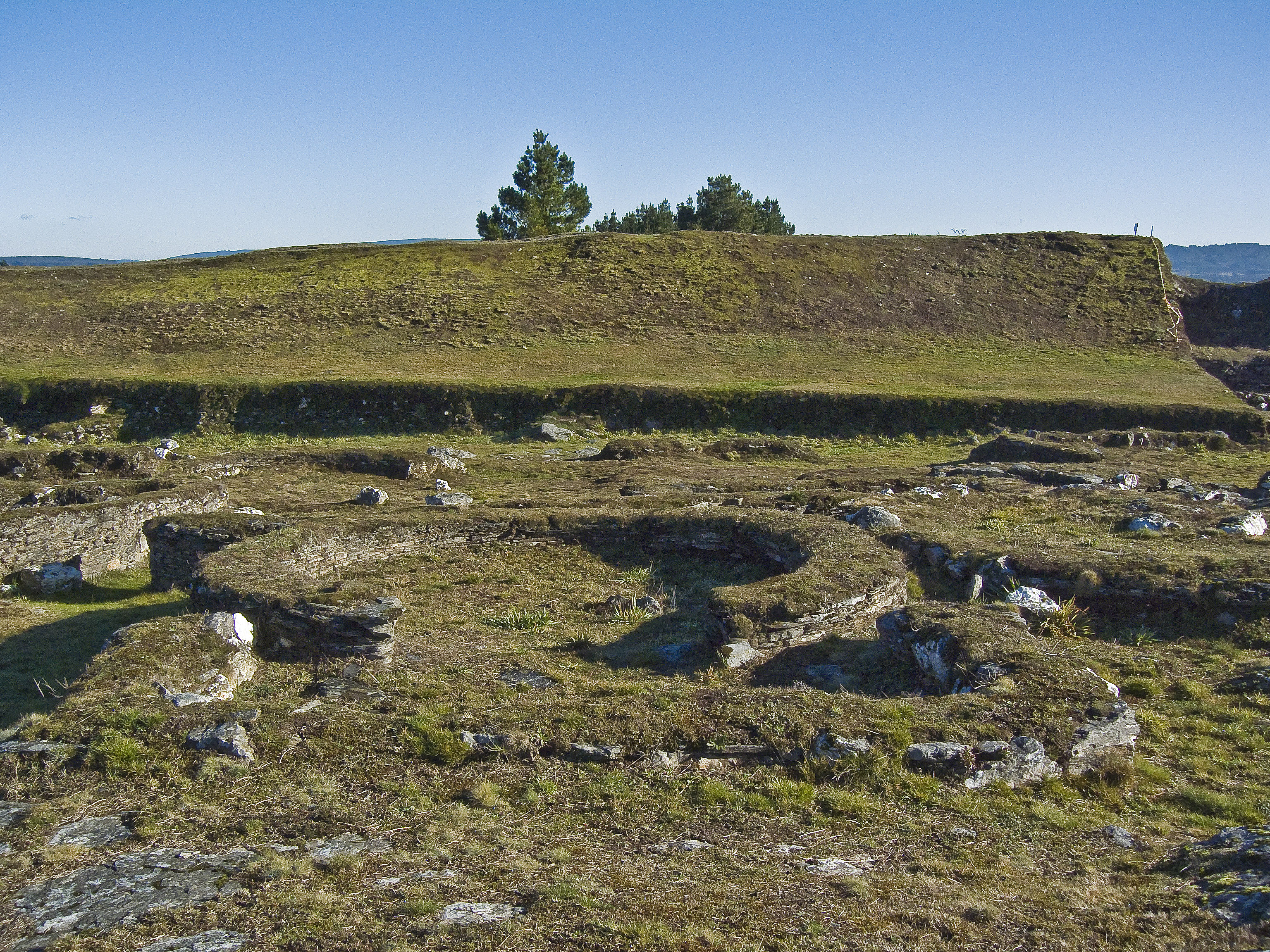 Construción circular no Castro de Viladonga